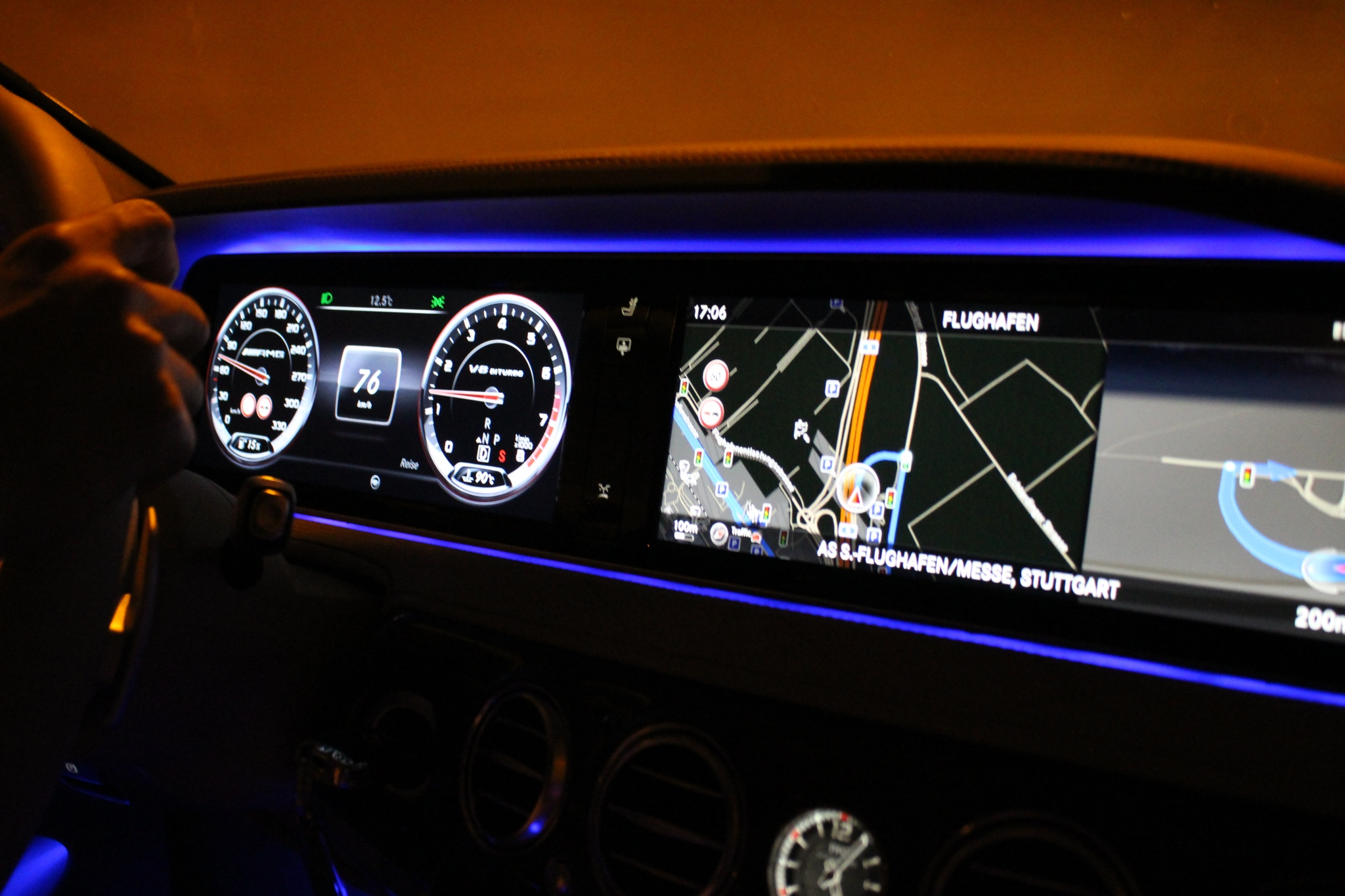 S63 AMG 2013